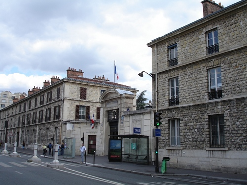 Ospedale di Parigi dove Laennec lavora ed inventa lo stetoscopio